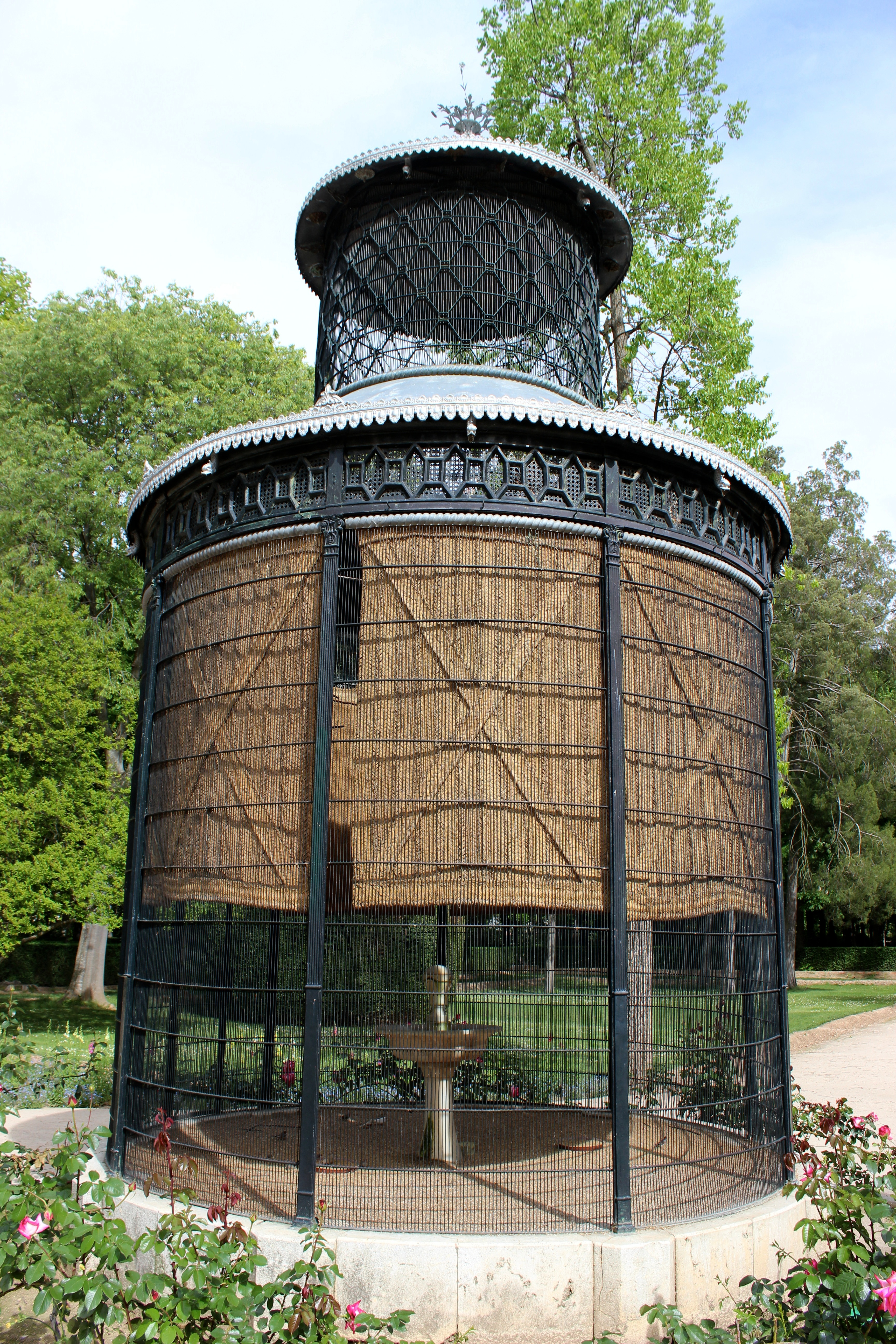 Aranjuez. Jardín de la Isla. Pajarera.